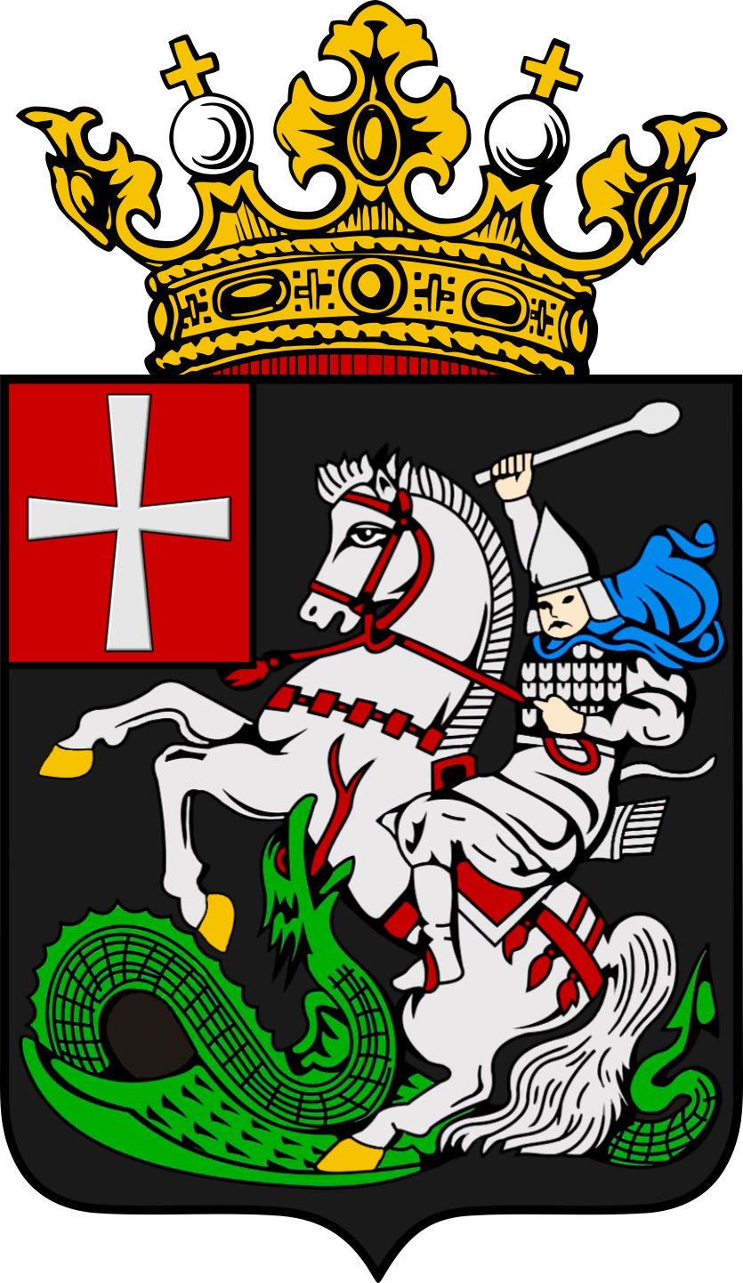 Герб Владимир-Волынского уезда, составленный на основе проекта герба города 1911 года в соответствии с реформой Б. Кене.